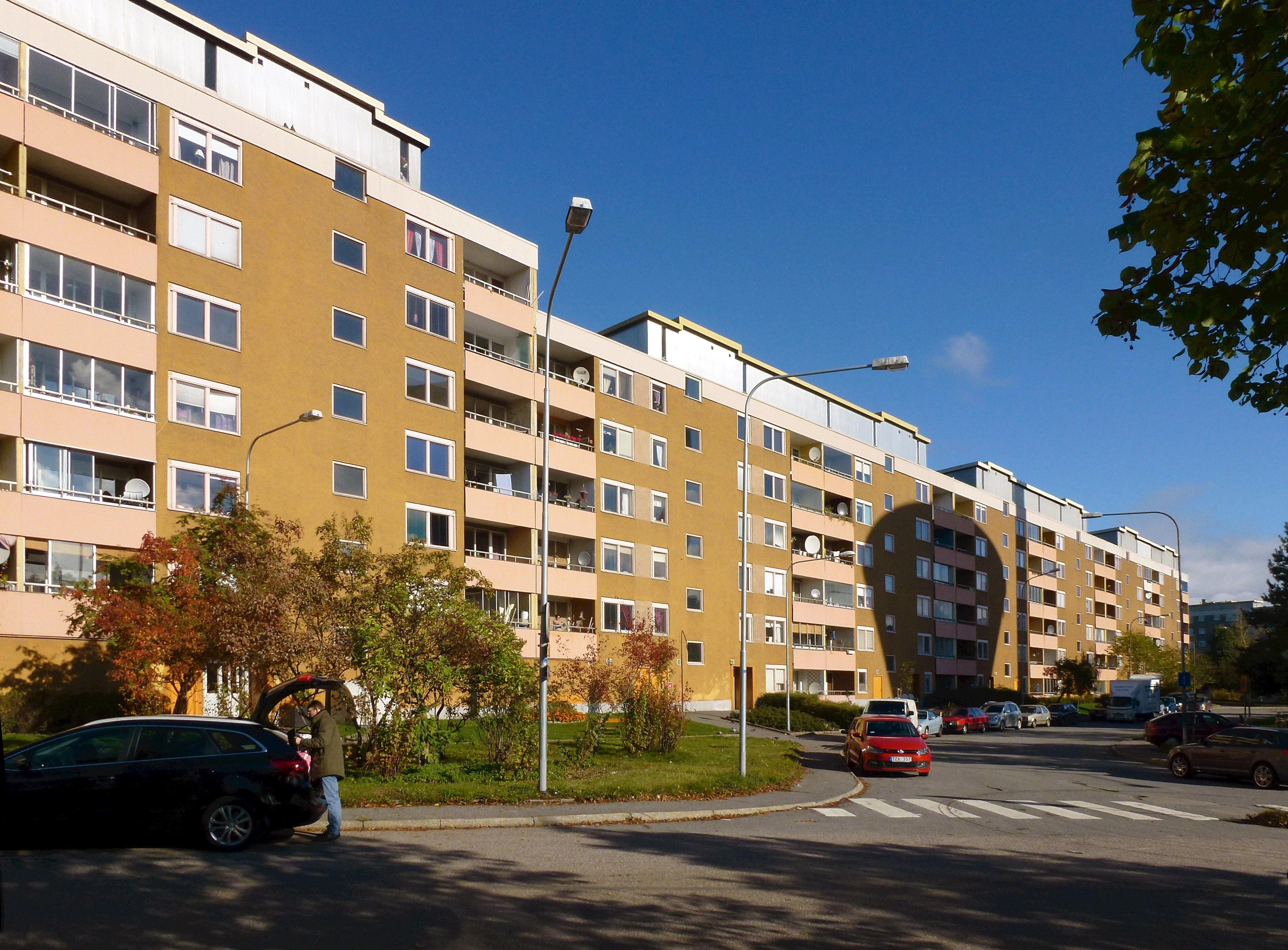 Henriksdalsberget 2013